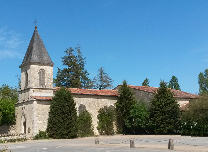 Eglise de Valllans-79-France